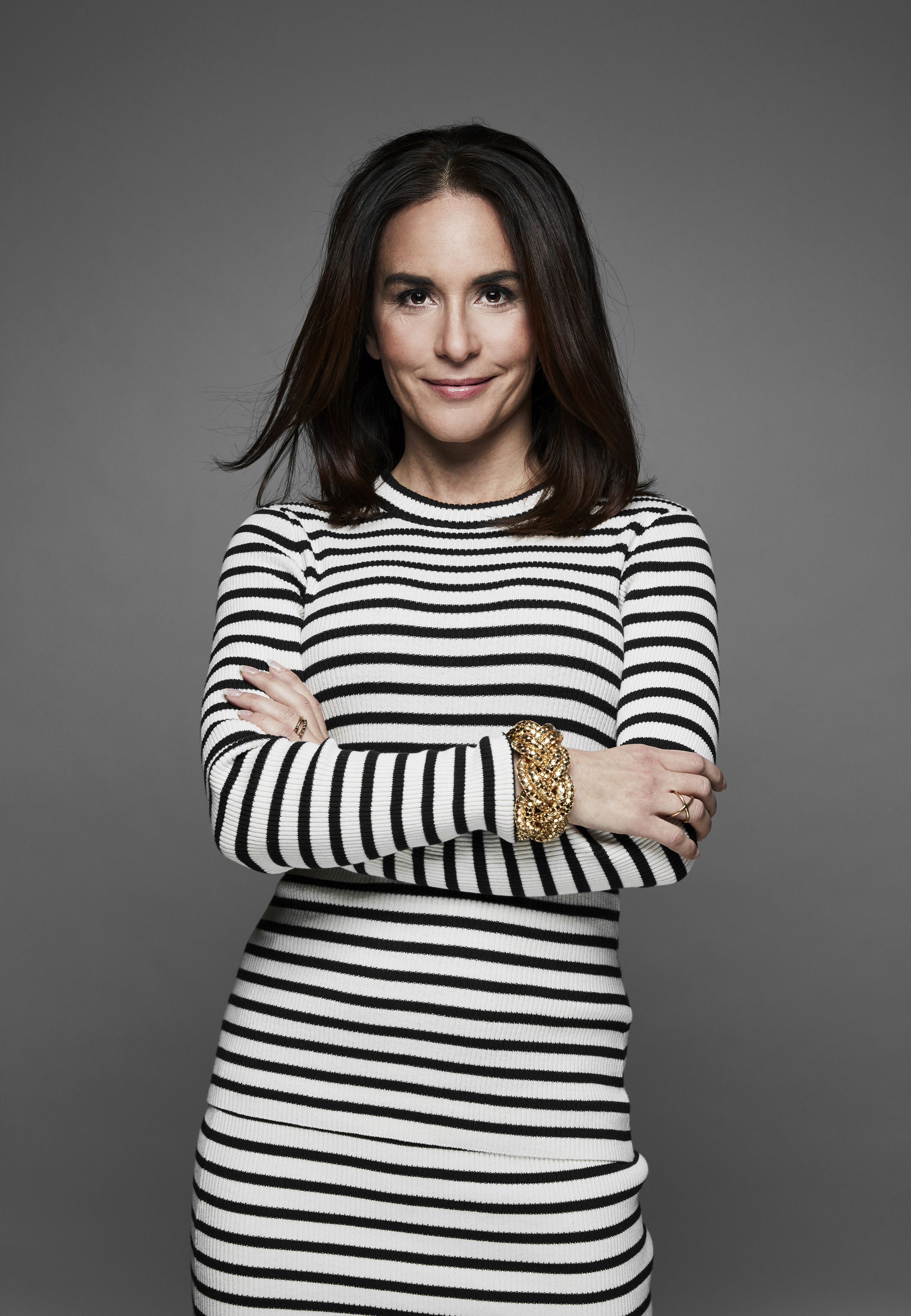 Skådespelerskan Alexandra Rapaport.